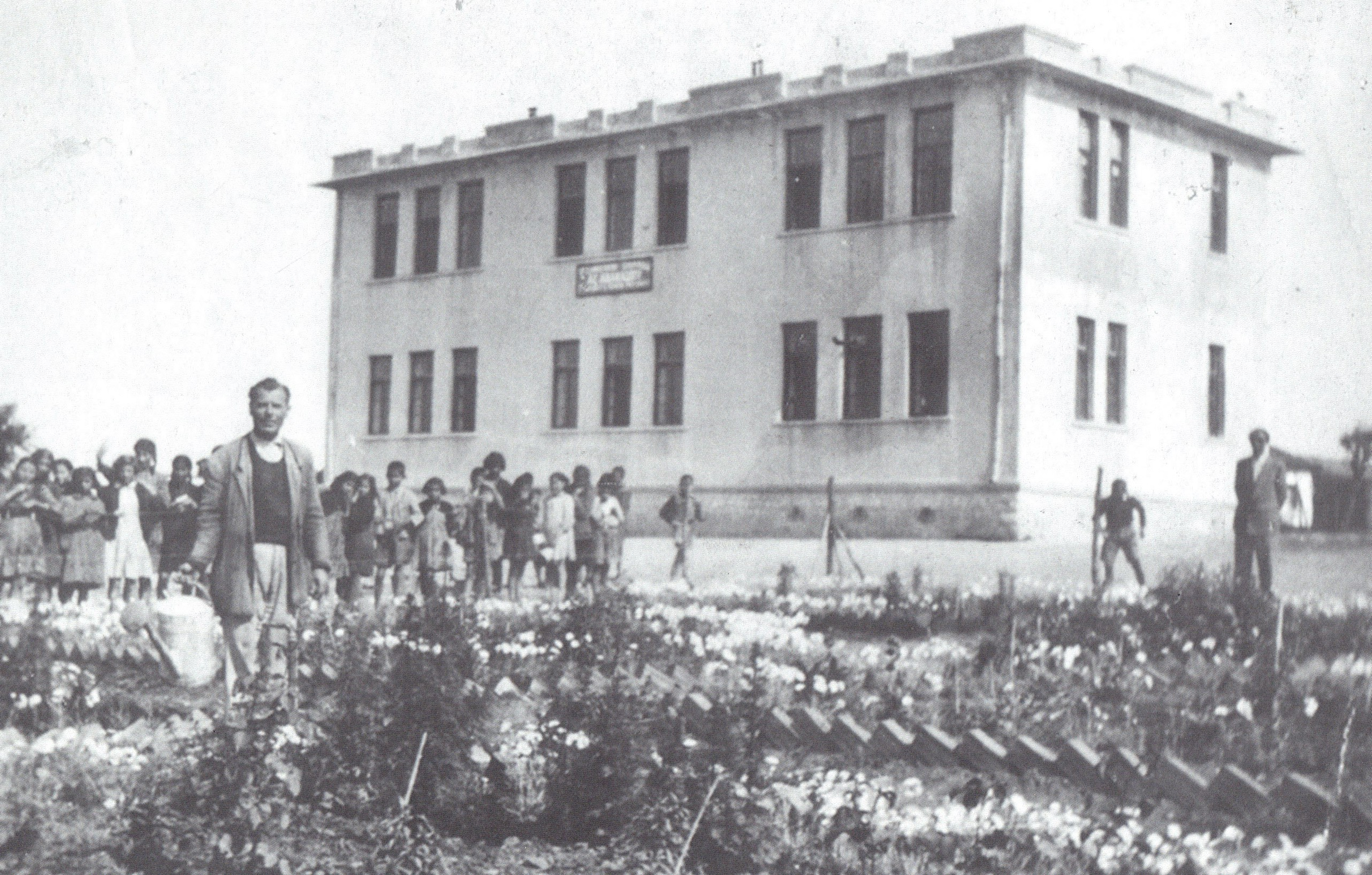 δημοτικό